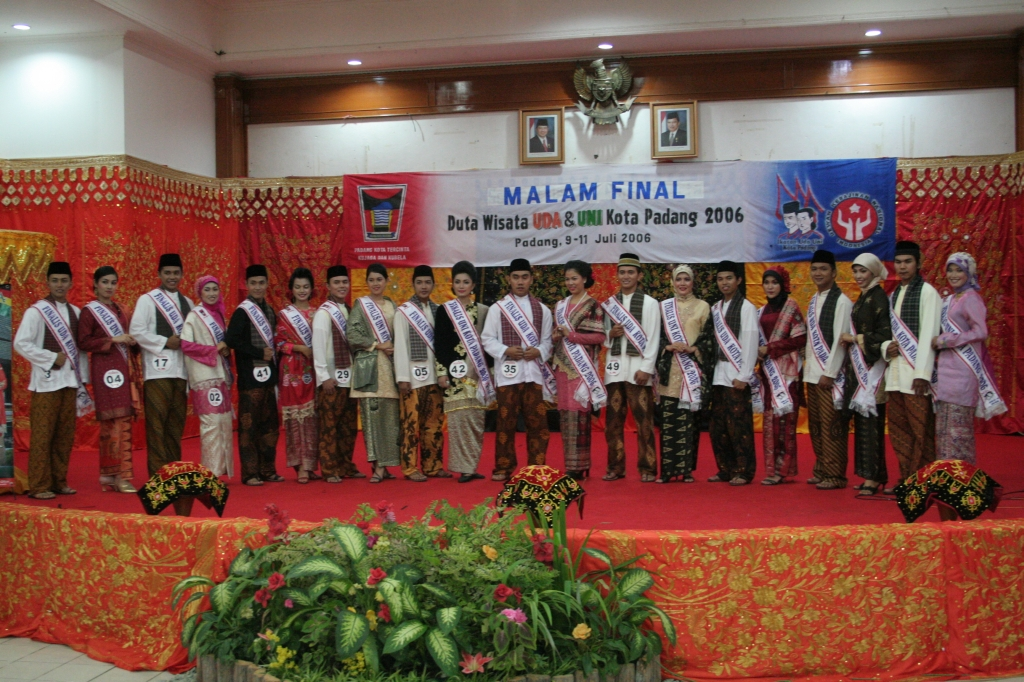 Uda Uni Sumatra Barat 2006